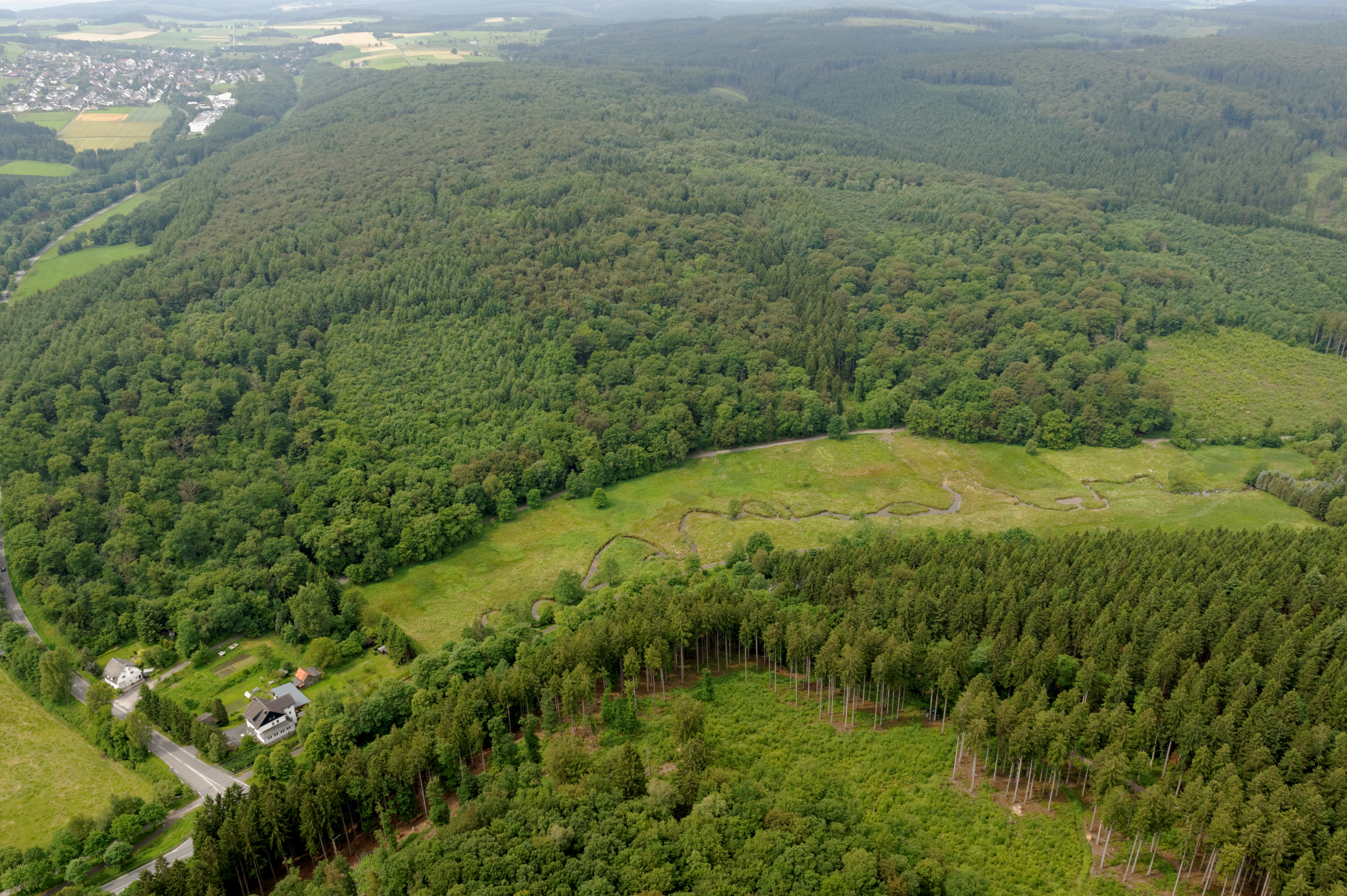 Fotoflug Sauerland Nord. Ehemaliger Scharfenberger Bahnhof mit Teil des Naturschutzgebietes Oberes Möhnetal (HSK-482) und oben Naturschutzgebiet Wünnenbecke. The making of this document was supported by the Community-Budget of Wikimedia Germany.